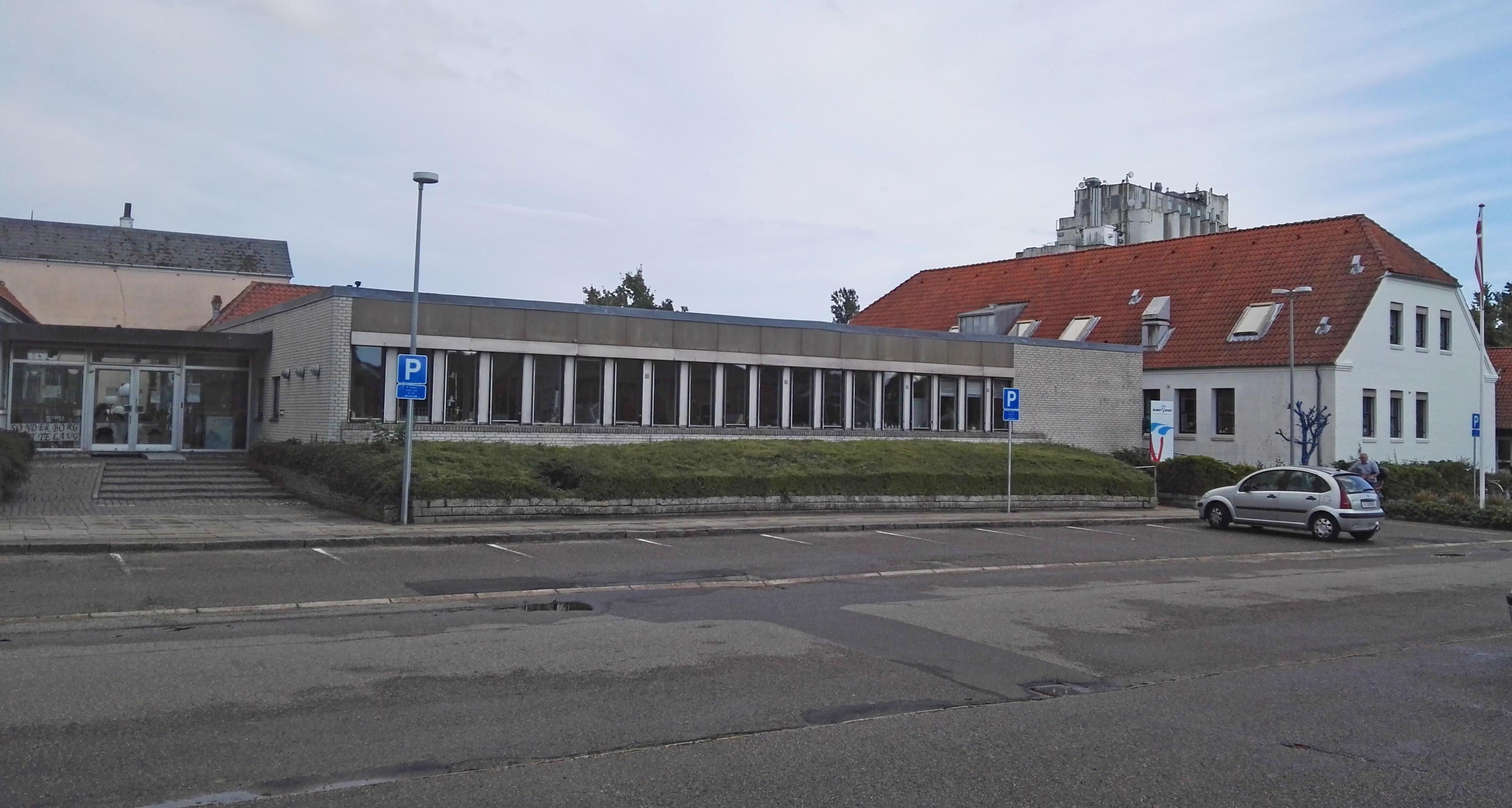 Den nyere del af Augustenborg Kommunes rådhus på Louise Augustas Plads 1. Den blev i 2014 overtaget af kunstnersammenslutningen Kunstværket